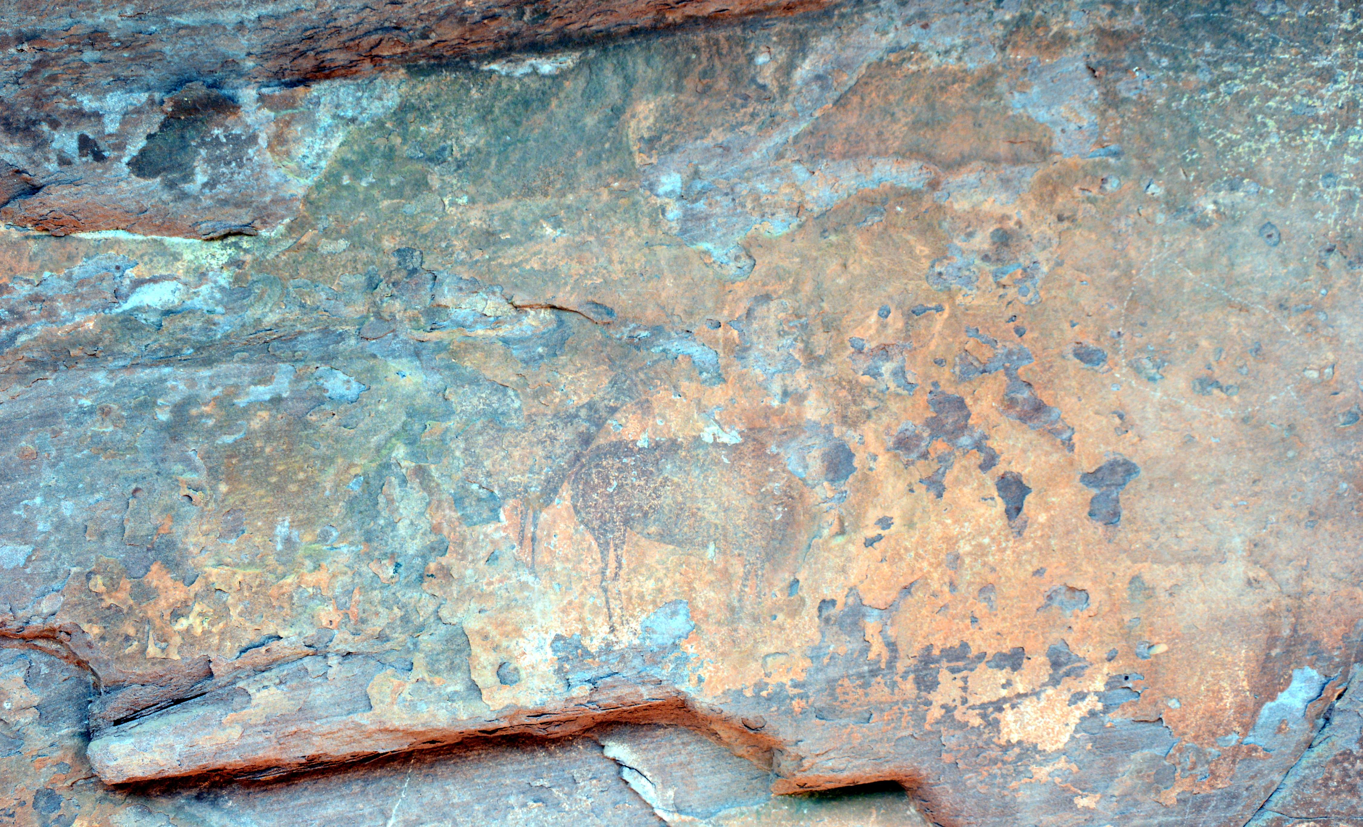 Detalle de panel decorado (cérvidos estáticos: natural) en el Abrigo del Prao Medias, Rodeno de Tormón, Parque Cultural de Albarracín (2018).